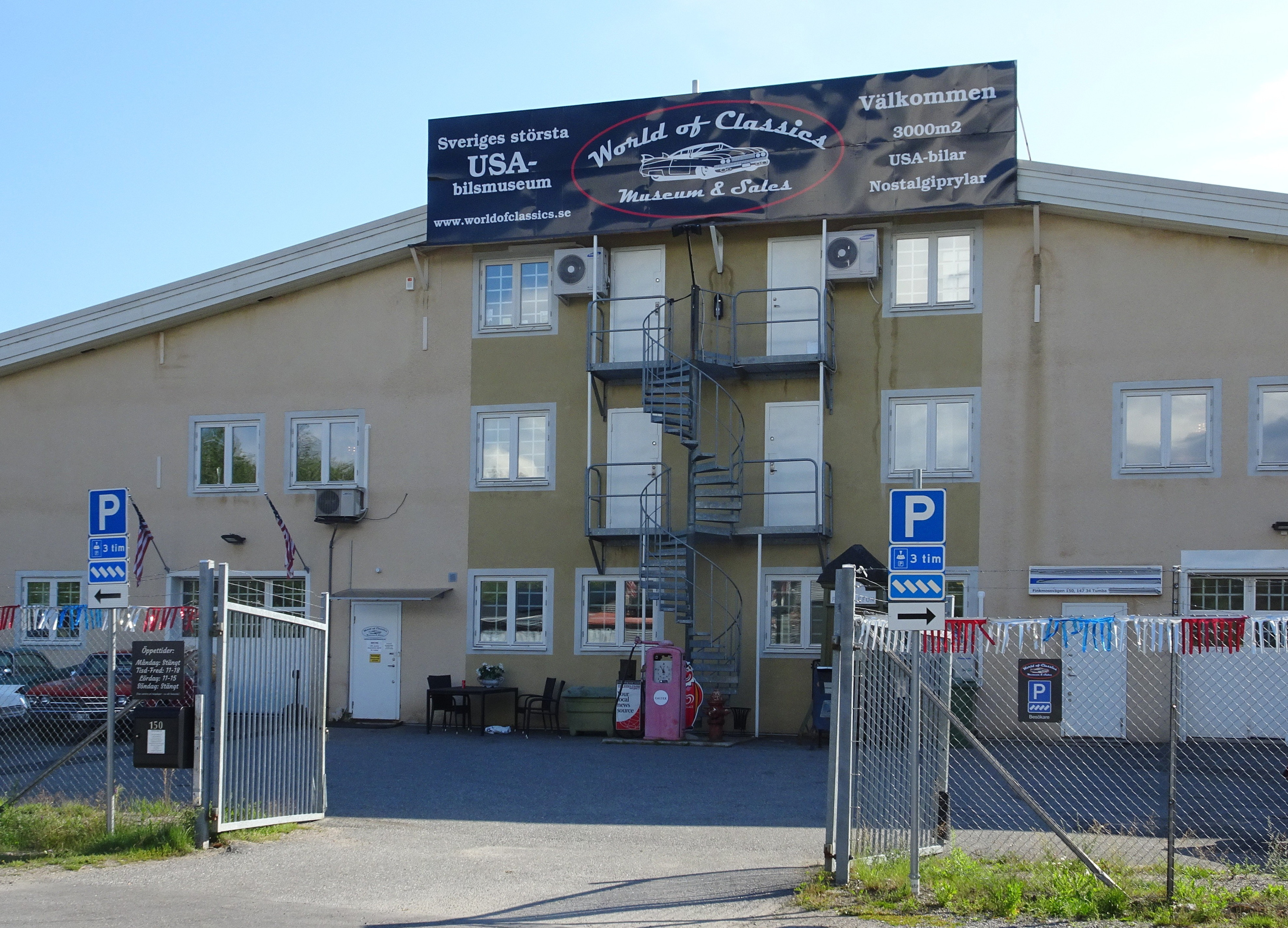 World of Classics, bilmuseum i Tumba